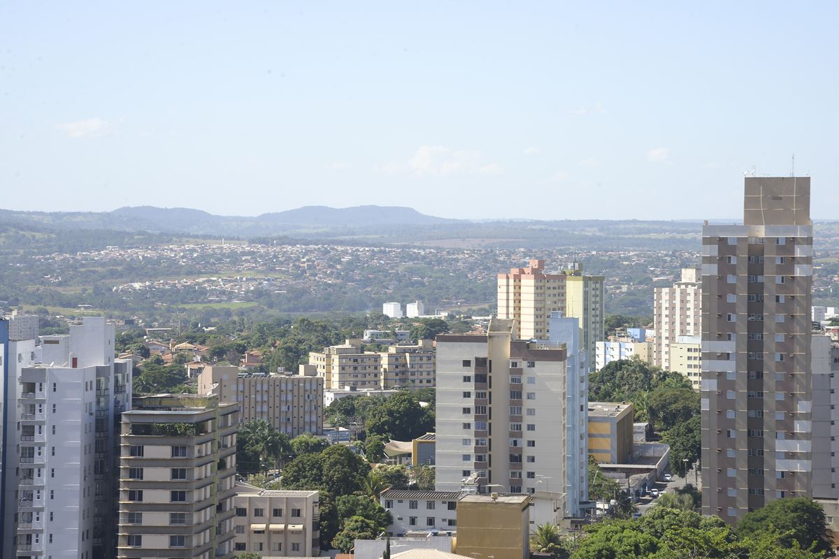 O presidente da Empresa Brasileira de Serviços Hospitalares (Ebserh), Kleber Morais, participou nesta quarta-feira, 21, da cerimônia de inauguração do novo espaço para a Farmácia Ambulatorial e do serviço de diagnóstico por meio do exame de ressonância magnética do Hospital das Clínicas da Universidade Federal de Goiás (UFG). Na oportunidade, também foi reinaugurado o Pronto Atendimento, que passou por reformas. Foto: Carlos Siqueira/GO.